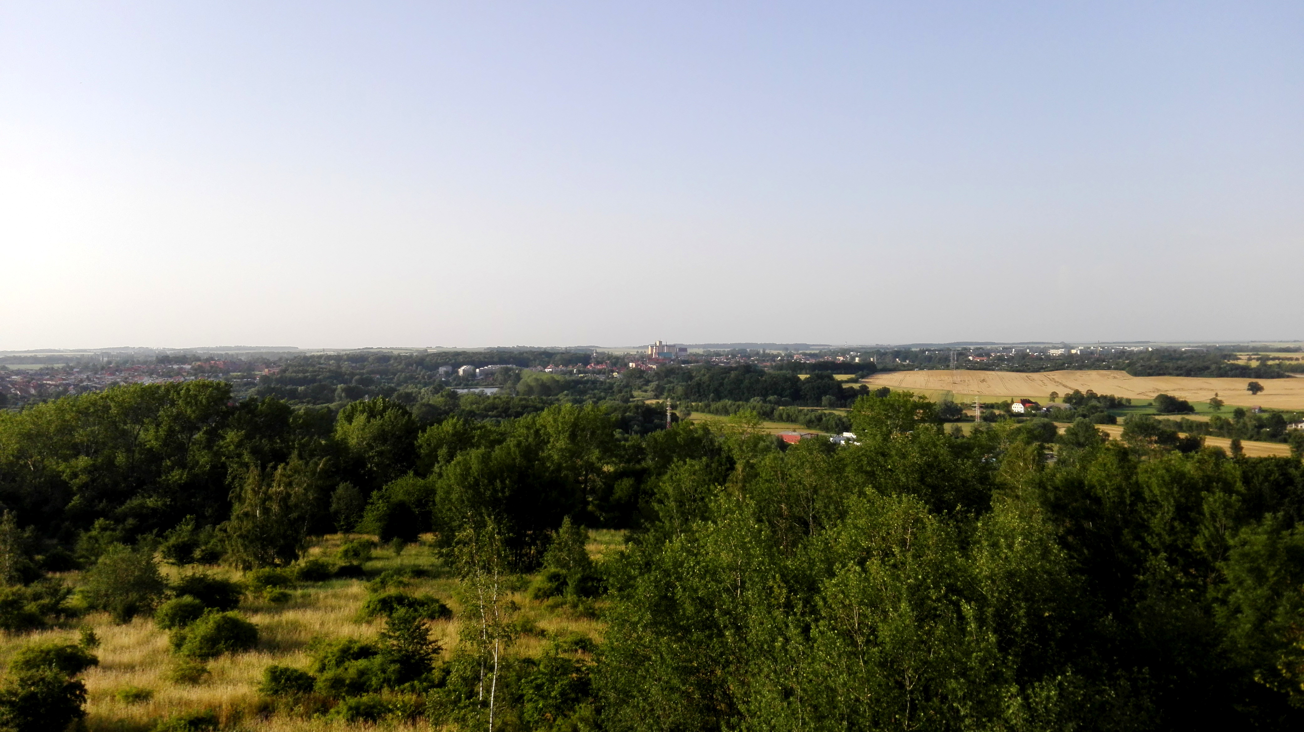 Prudnik, Klasztorne Wzgórze (Kozia Góra), bezleśny fragment grzbietu Okopowej - widok z wieży widokowej na panoramę Prudnika